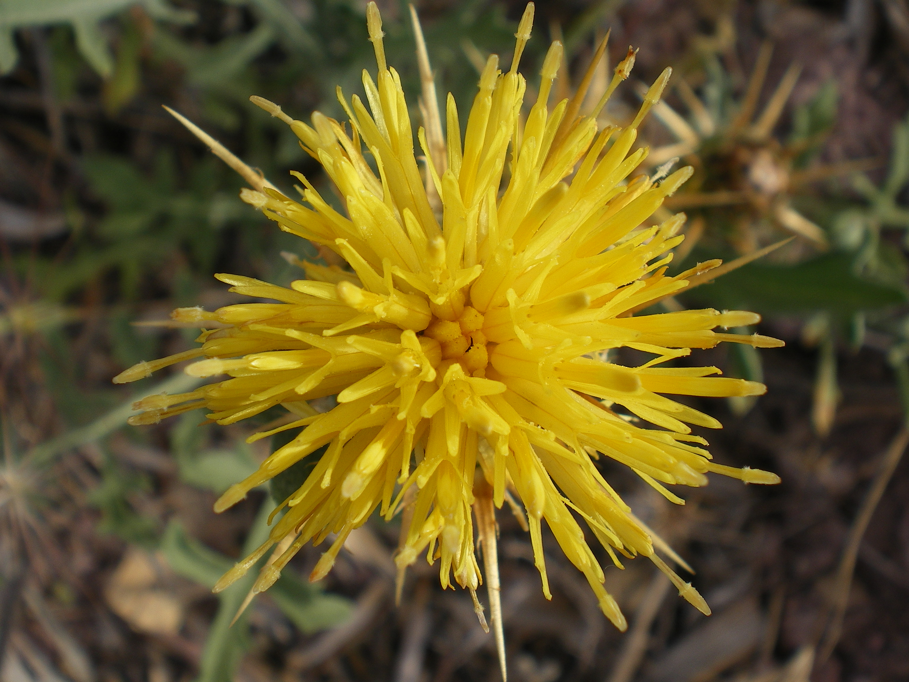 Fotografía de vista superior de inflorescencia de Centaurea kunkelii, tomada en Sierra de Gádor, Almería, España.